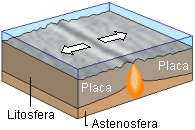 Autor: Usuario:Lmb